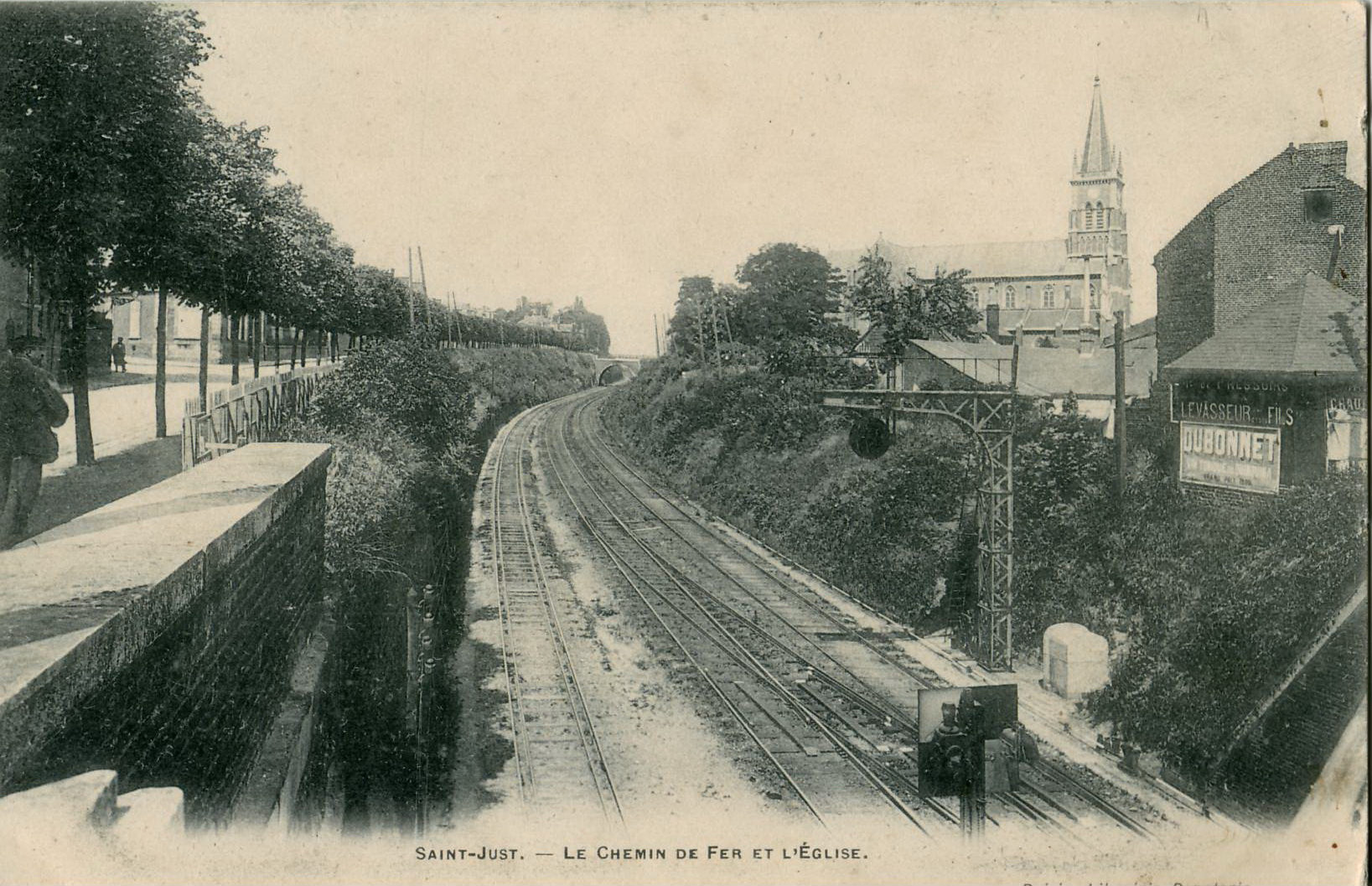 Carte postale ancienne éditée par Bréger Frères à ParisGare de Saint-Just-en-Chaussée (Oise) : Le Chemin de fer et l'église